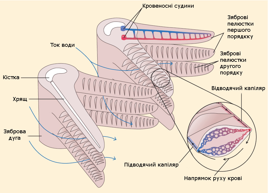 FishGills2.jpg: Будова судин кровеносної системи риб